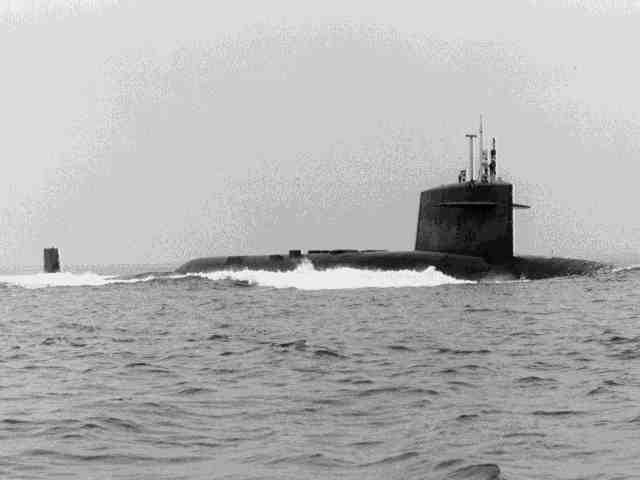 USS Ethan Allen (SSBN-608)